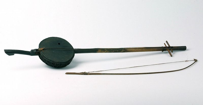 Strijkinstrument. Viool met twee snaren en strijkstok Unknown language: Arbab